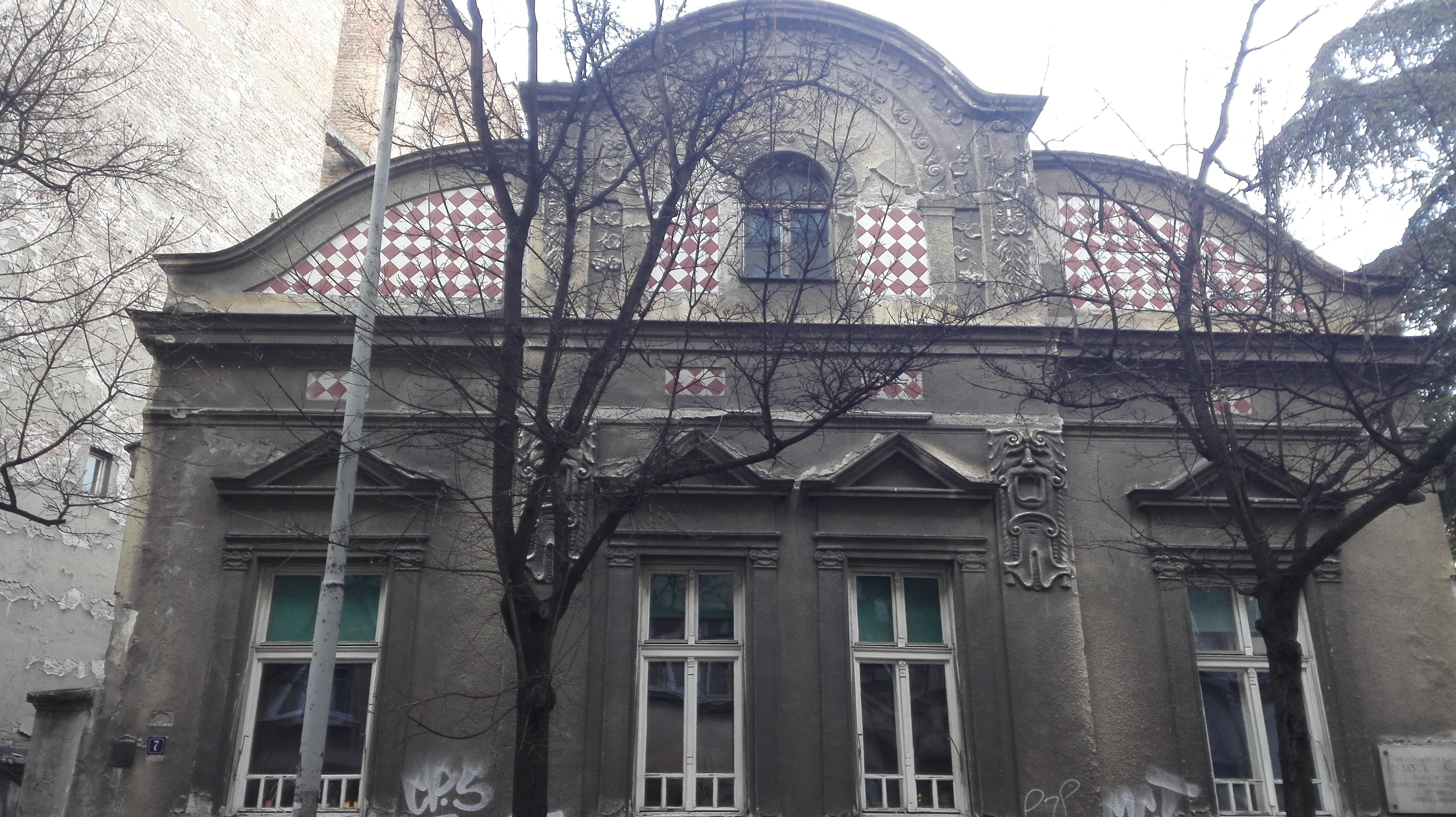 Kuća u kojoj je živeo Laza Lazarević